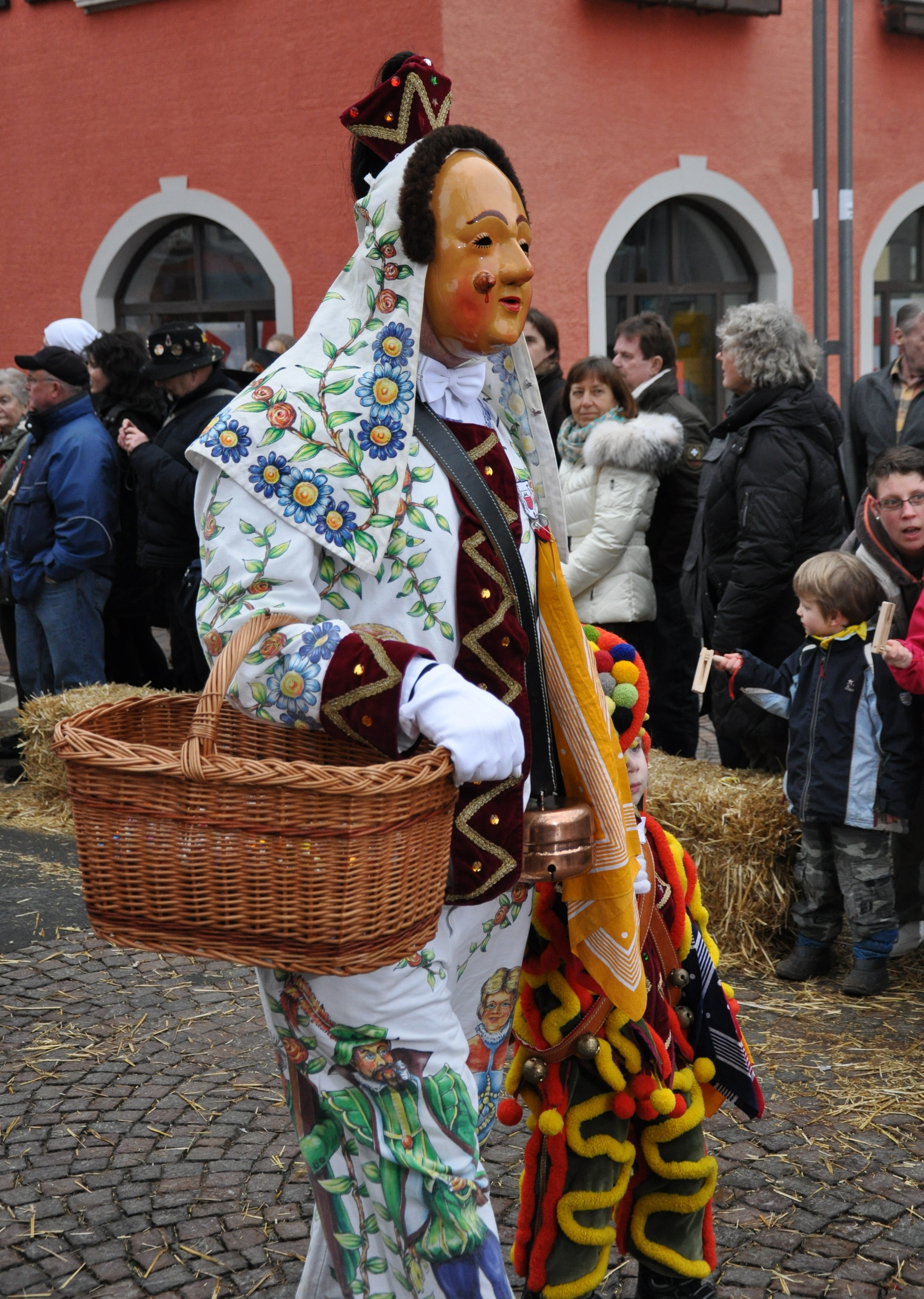 Narrenzunft Schömberg; Narrenfigur: Warz Fotografiert beim Landschaftstreffen der Vereinigung Schwäbisch-Alemannischer Narrenzünfte (VSAN) 2014 in Tettnang; Narrensprung am Sonntag, 16. Februar 2014